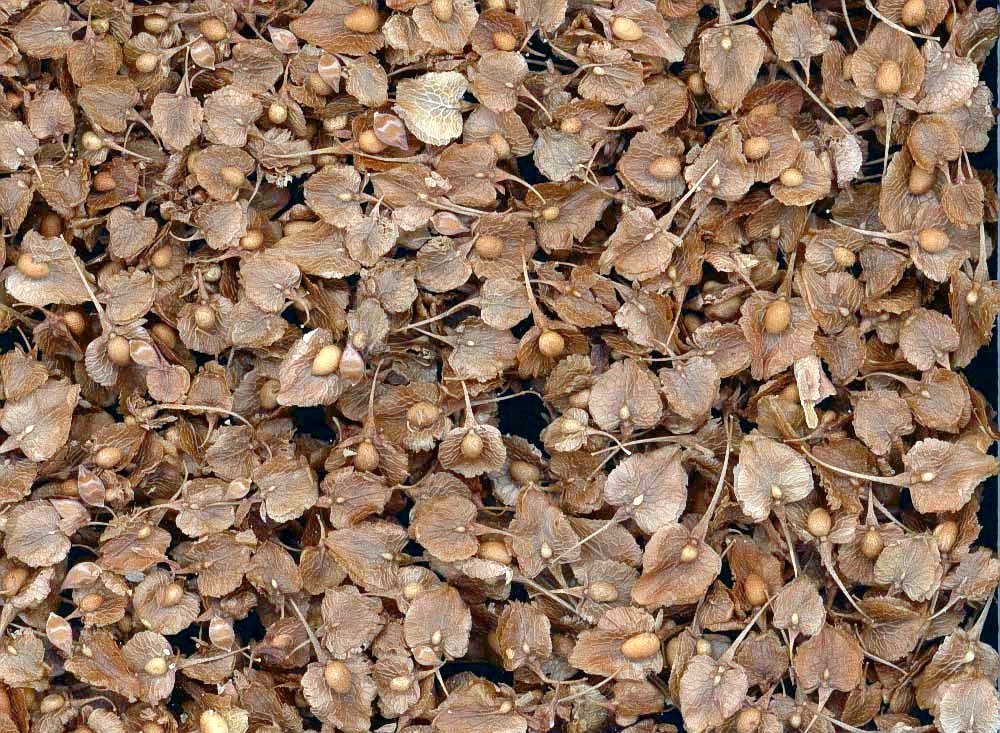 Rumex crispus (Romanza) : Frutos maduros - 27.06.2006 - Tajikistan.